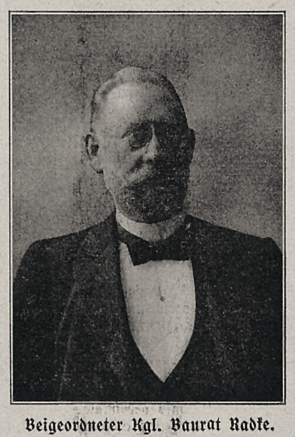 Beigeordneter Kgl. Baurat Radke, Foto in Rhein und Düssel (Nr. 30), vom 28. Juli 1907